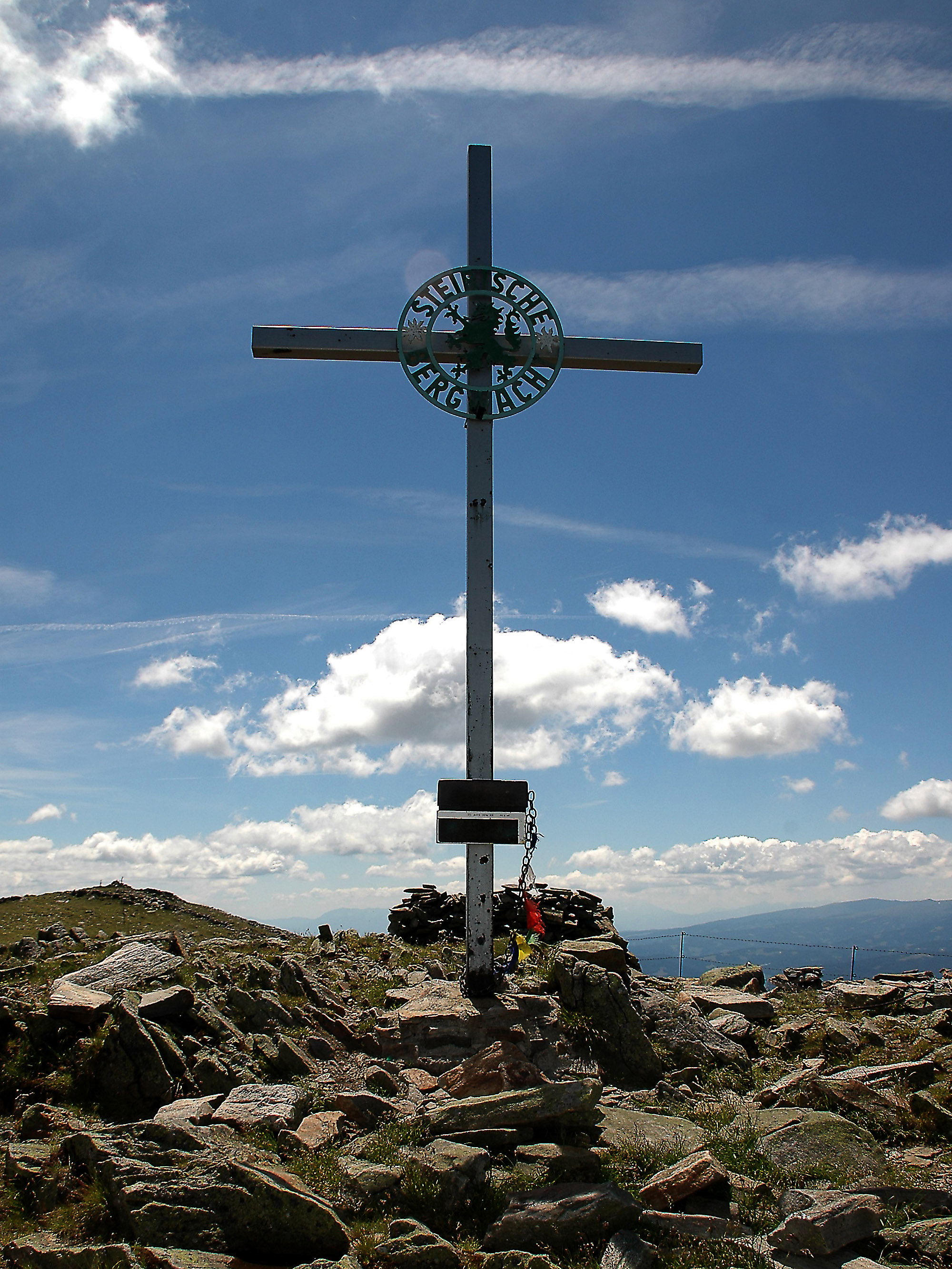 Amering Gipfelkreuz Der Ameringkogel ist mit 2.187 Meter die höchste Erhebung der Packalpe. Die Steirische Berg- und Naturwacht hat dieses Gipfelkreuz im Jahre 1973 errichtet